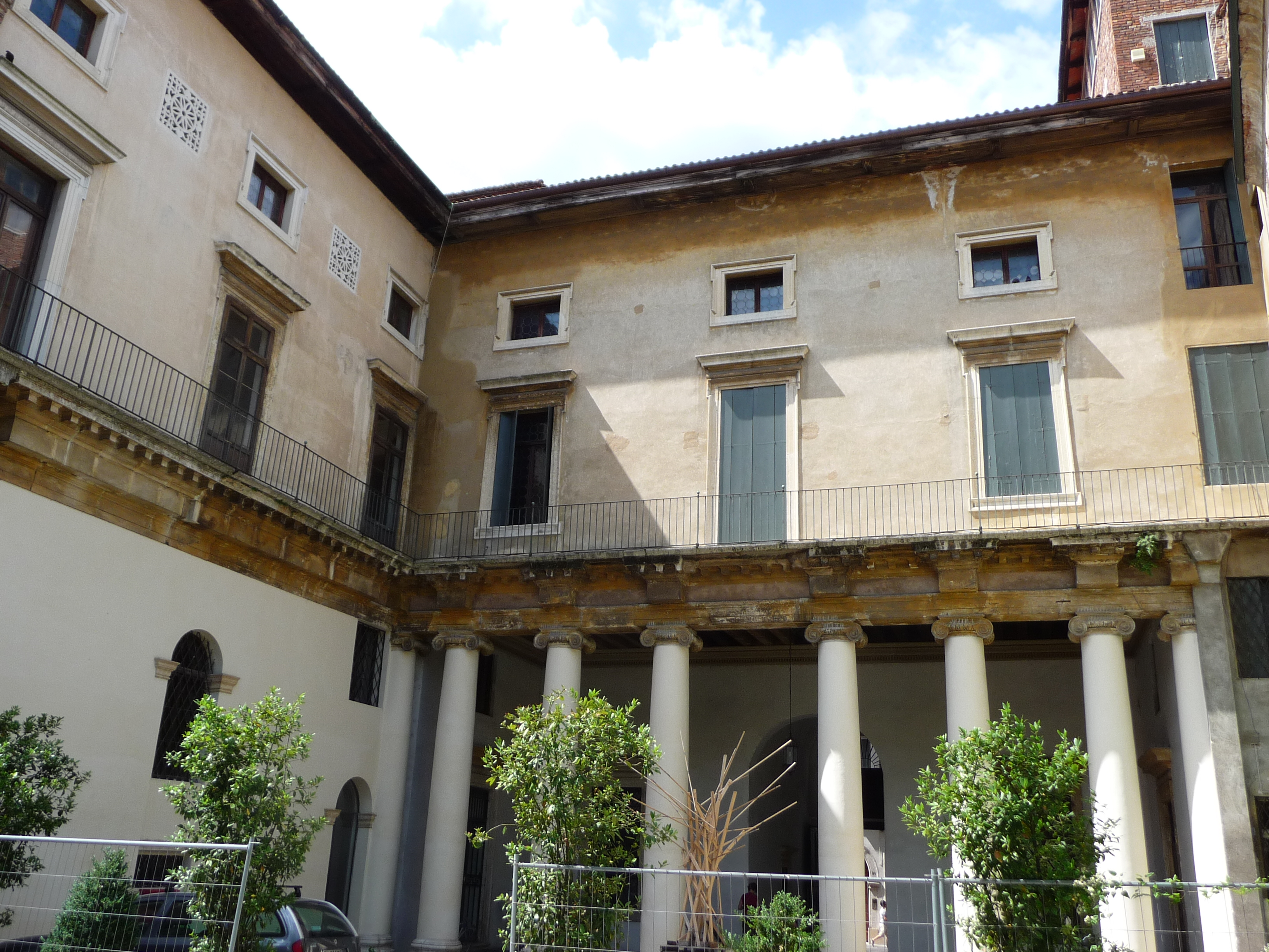 Facciata posteriore del palazzo, con loggia al piano terreno, vista dal cortile.